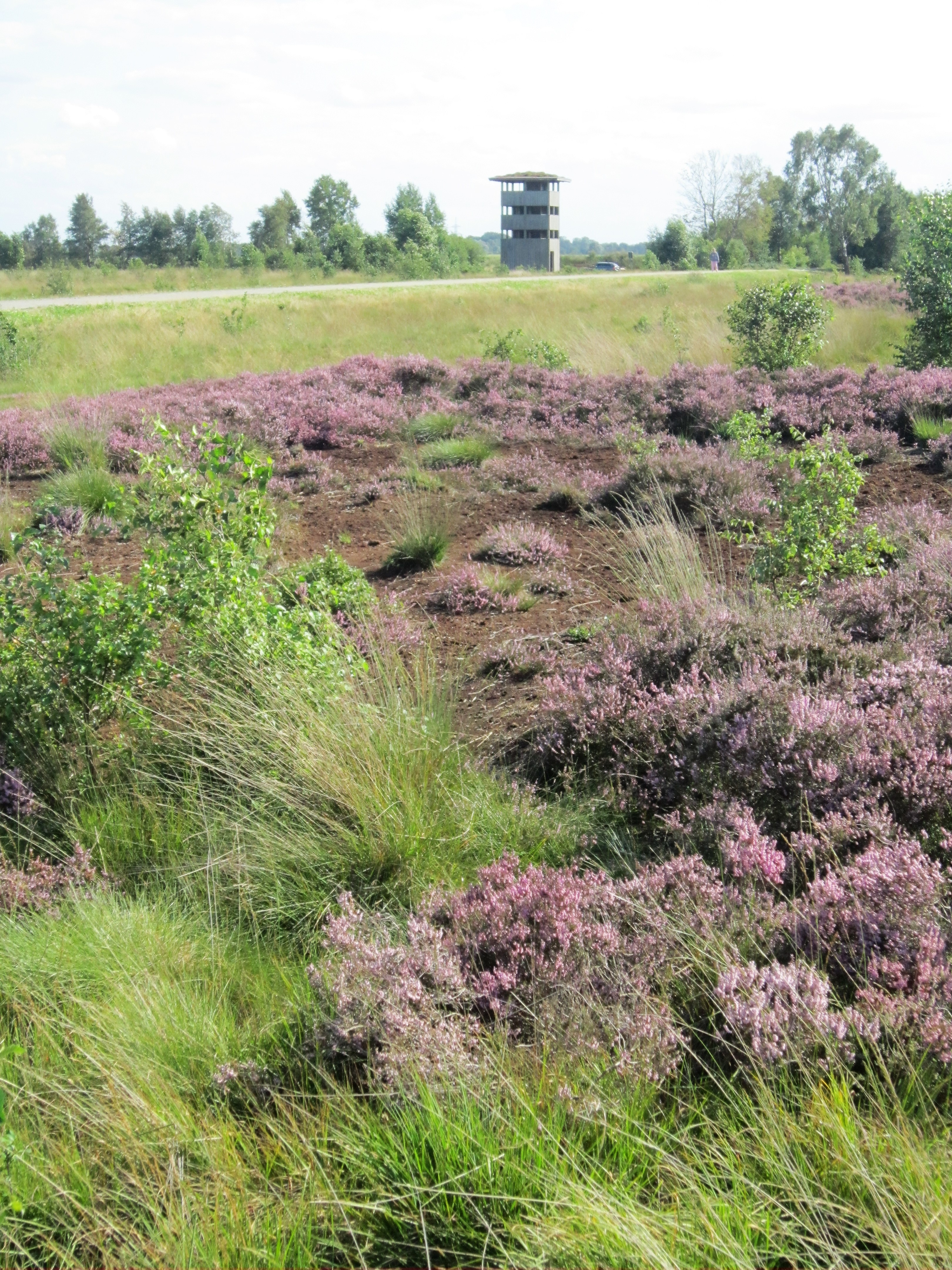 Streifenartig blühende Heide (Calluna vulgaris) im Süden des Rehdener Geestmoors. Im Hintergrund der Aussichtsturm am Moordamm.